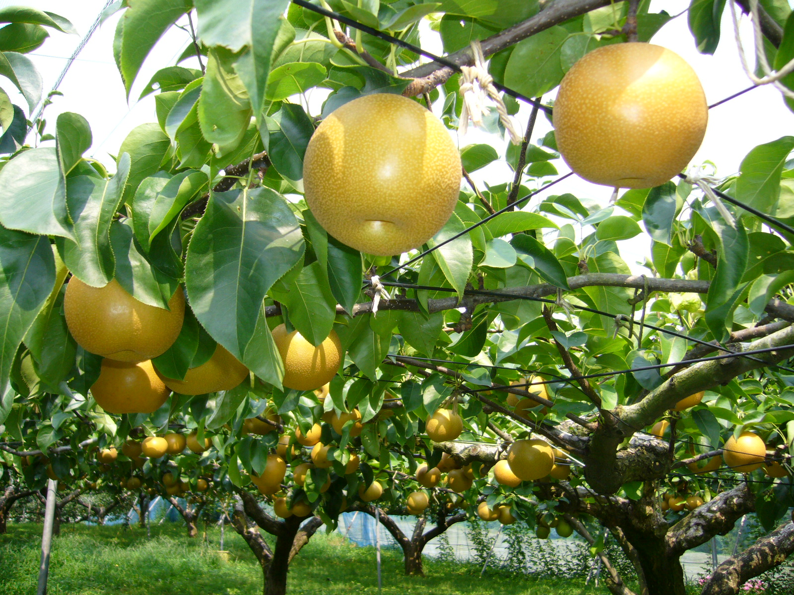 pear-tree,katori-city,japan